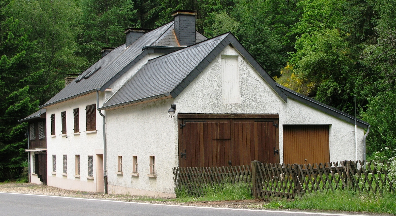 D'Rossmillen am Mee 2008.